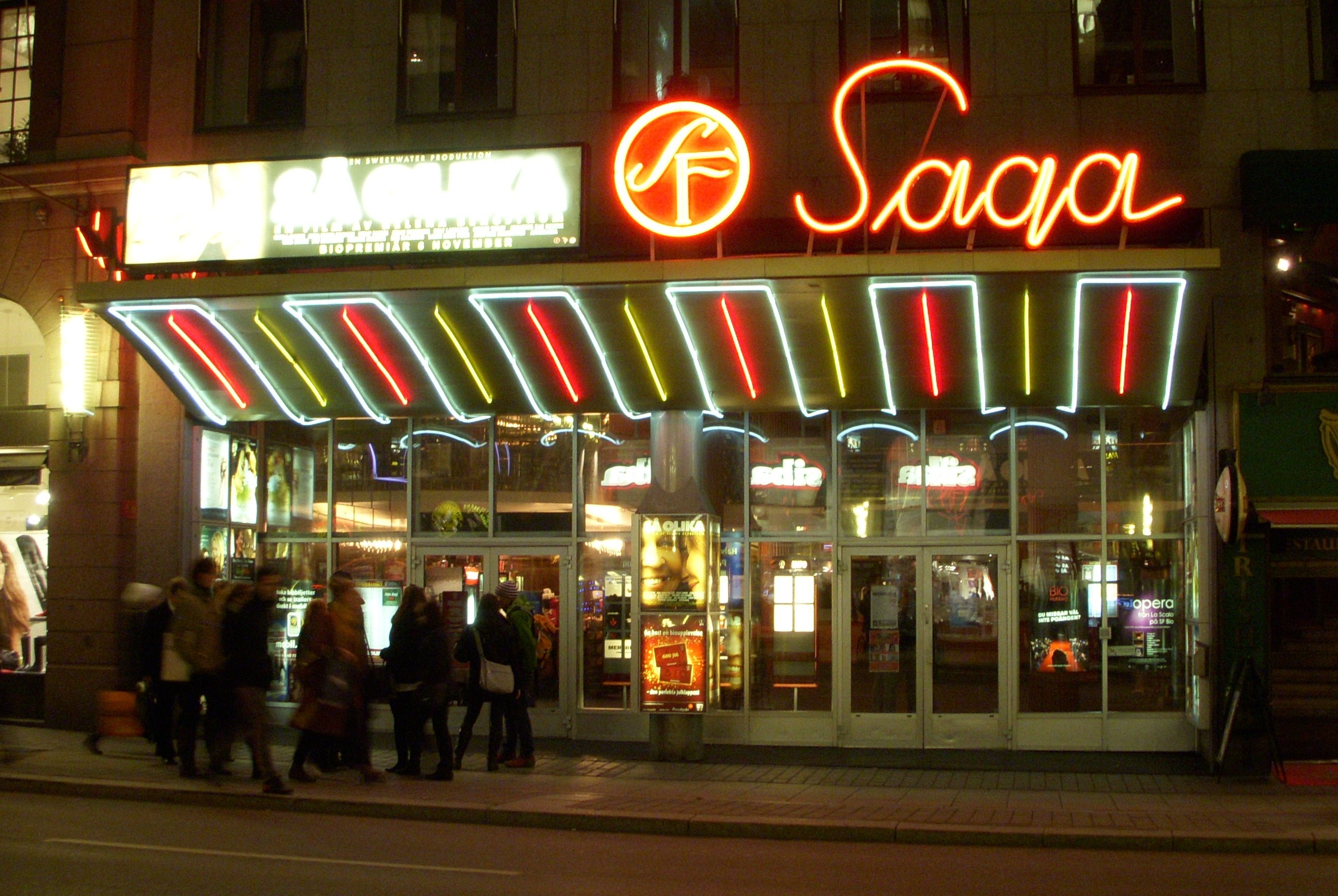 Biografen "Saga" Kungsgatan, Stockholm